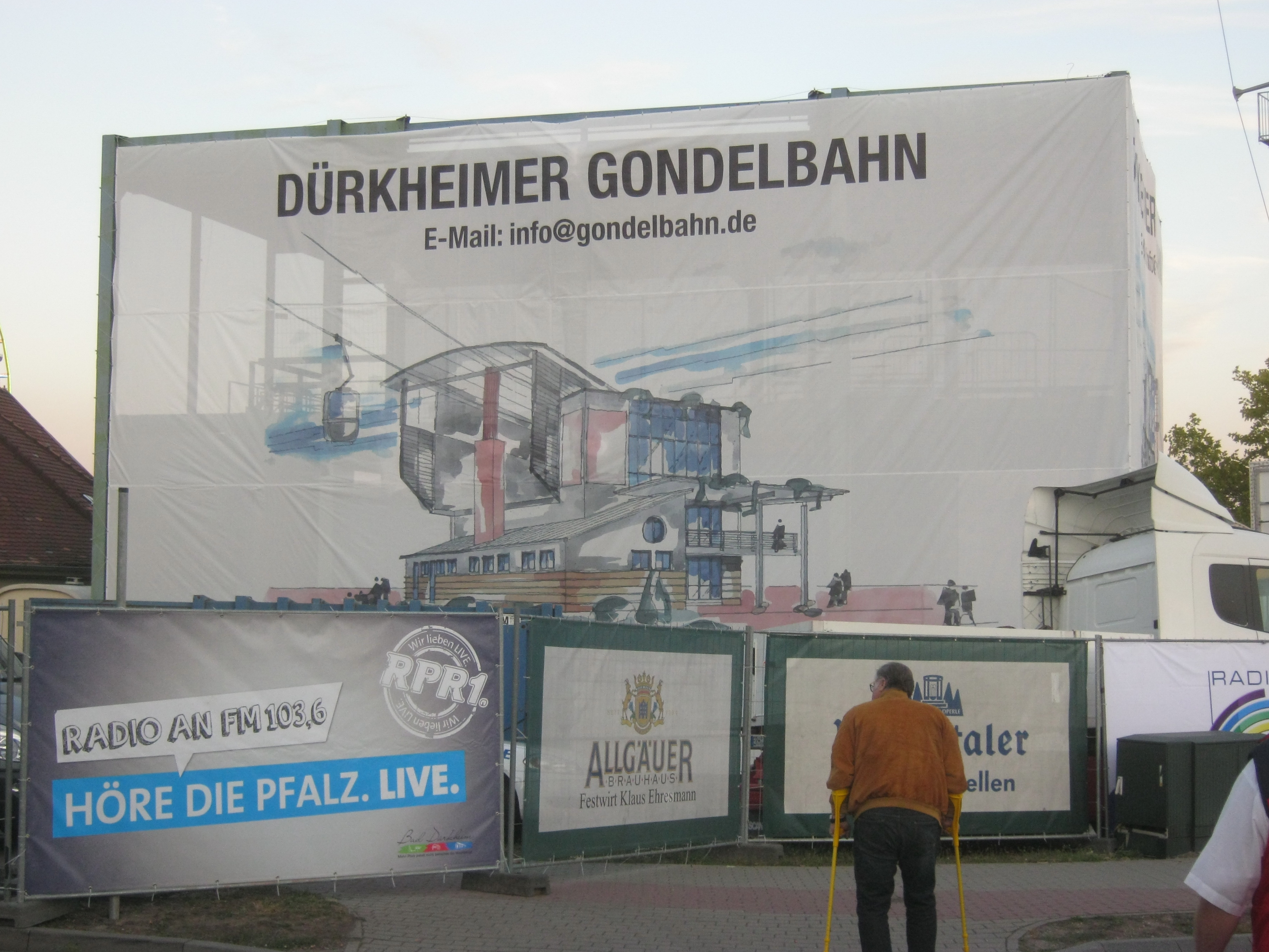 Talstation der Gondelbahn Bad Dürkheim